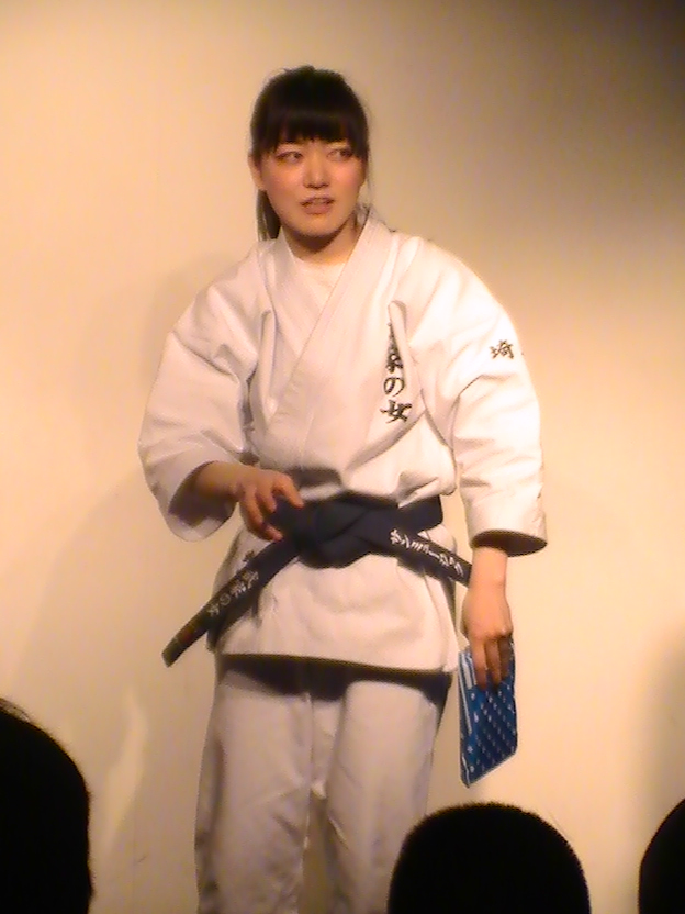 武家の女 (2016年2月)